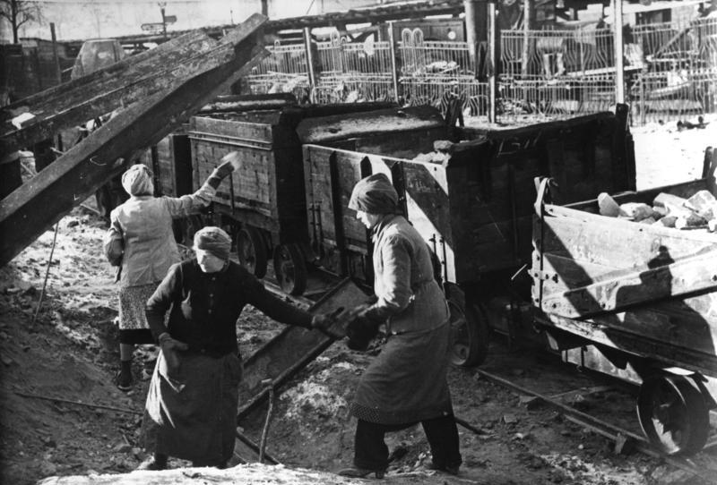 Berlin, Trümmerfrauen vor Loren Zentralbild Berlin 1946: UBz: Trümmerfrauen bergen Ziegelbruch, der in Loren zur Trümmeraufbearbeitungsanlage gebracht wird. 226-46